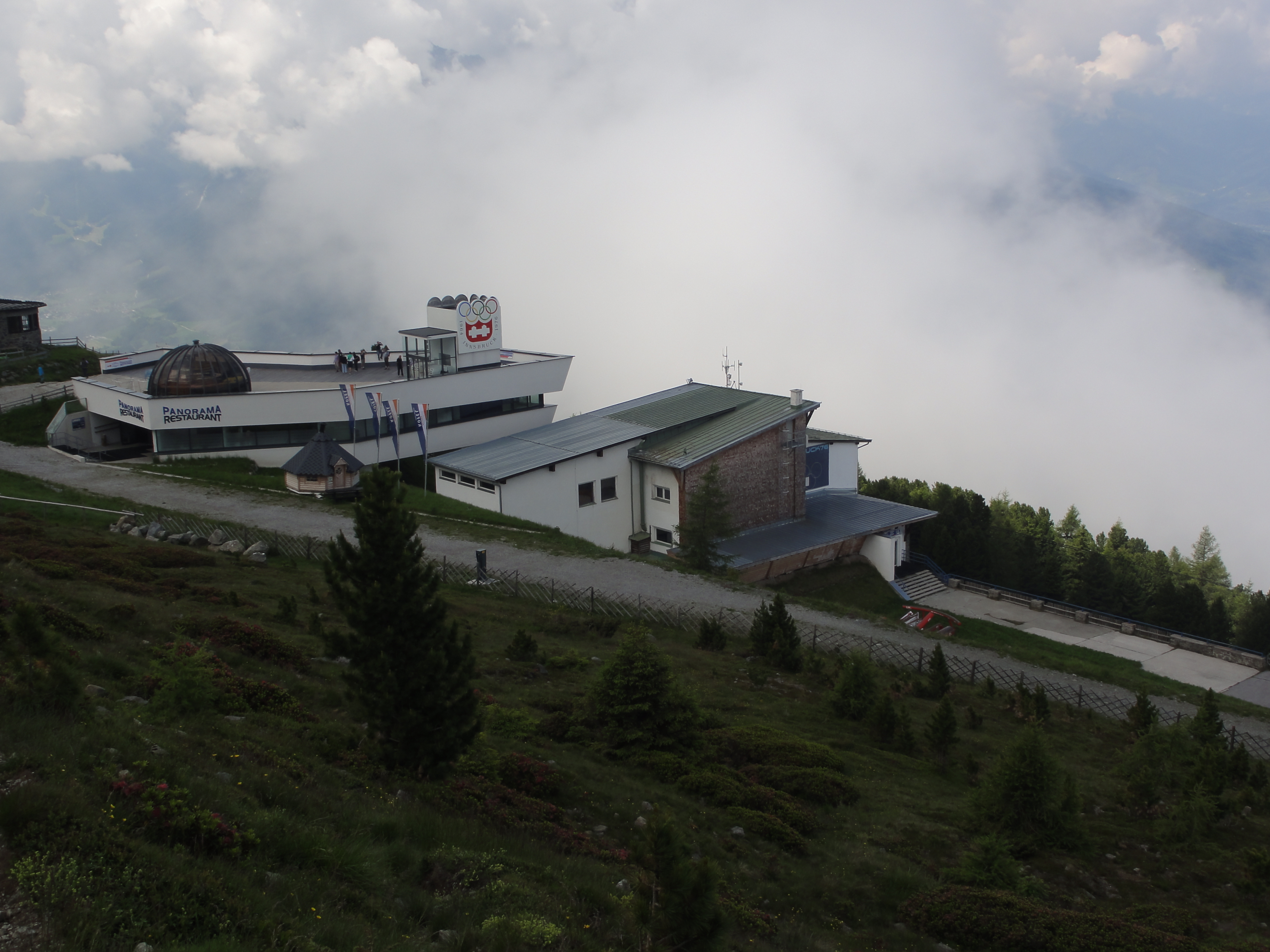 Austria, Tiroler Mittelland (Tuxer Alpen)